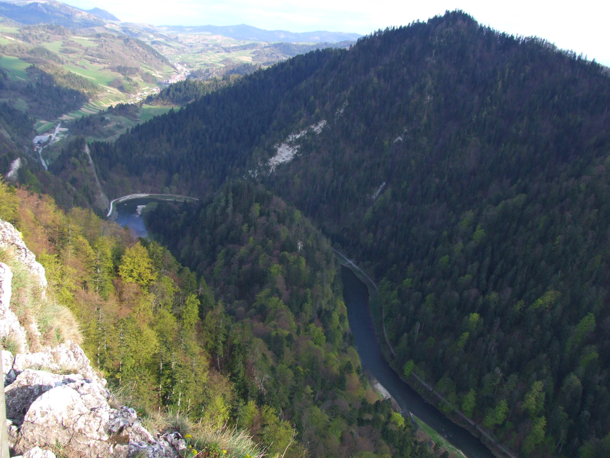 Przełom Pieniński. Ugóry Golica, w pętli Dunajca Przechodni Wierch. Widok z Sokolicy